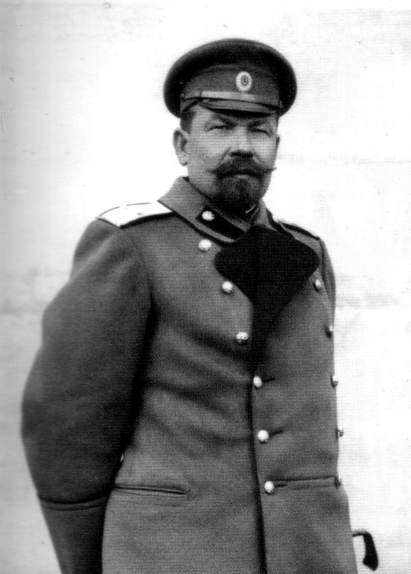 Василий Георгиевич Болдырев (1875-1933): Чин/звание: «Генерал-лейтенант» Знаки различия на картине: погоны и звёзды «Генерал-майор»